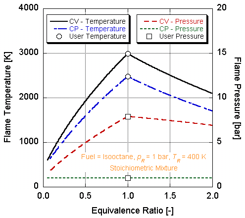 Energía interna contra Temperatura. Esquema que ilustra cálculos en un sistema cerrado